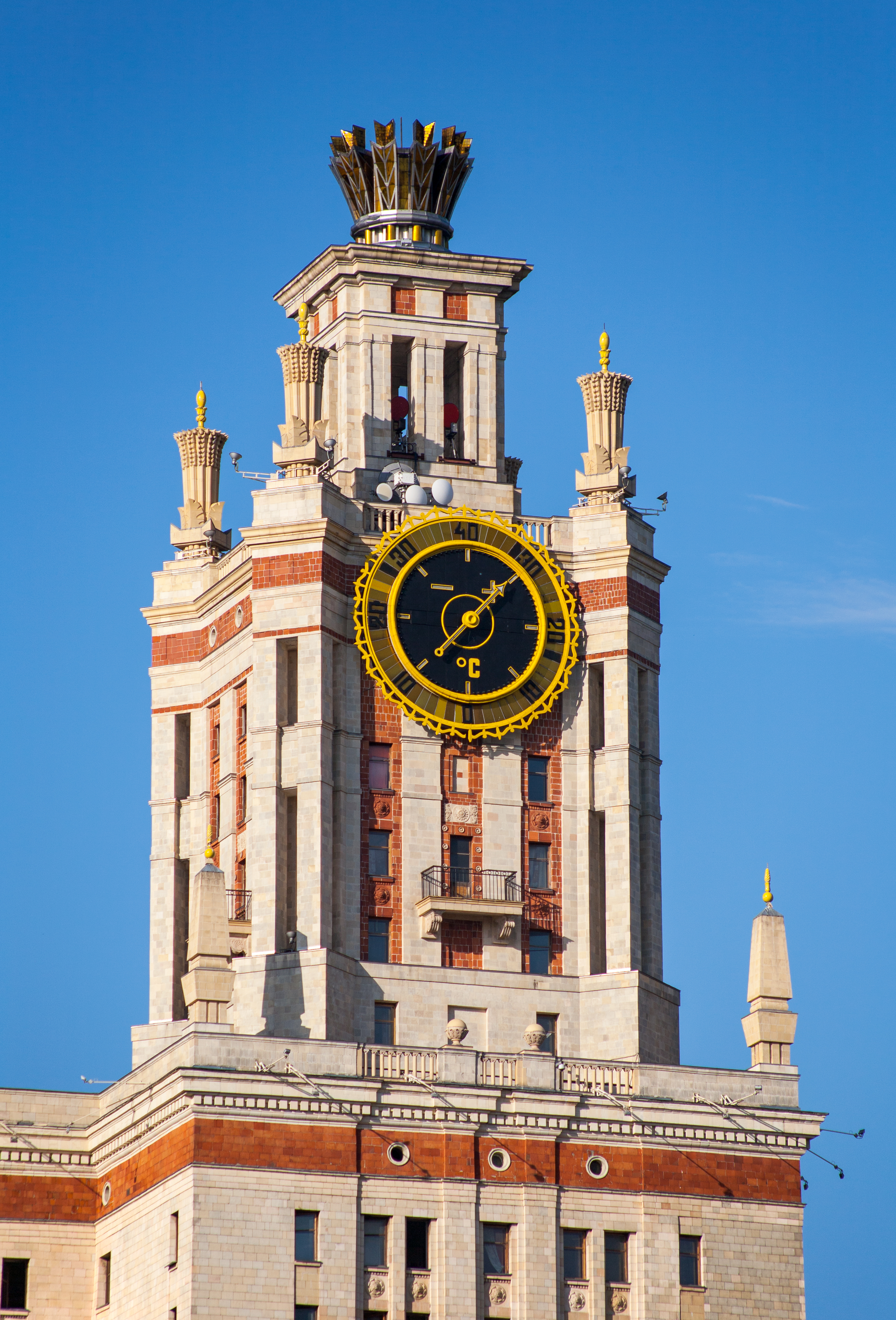 Главное здание Московского государственного университета. Правая (со стороны Ломоносовского проспекта) боковая башня с уличным термометром.